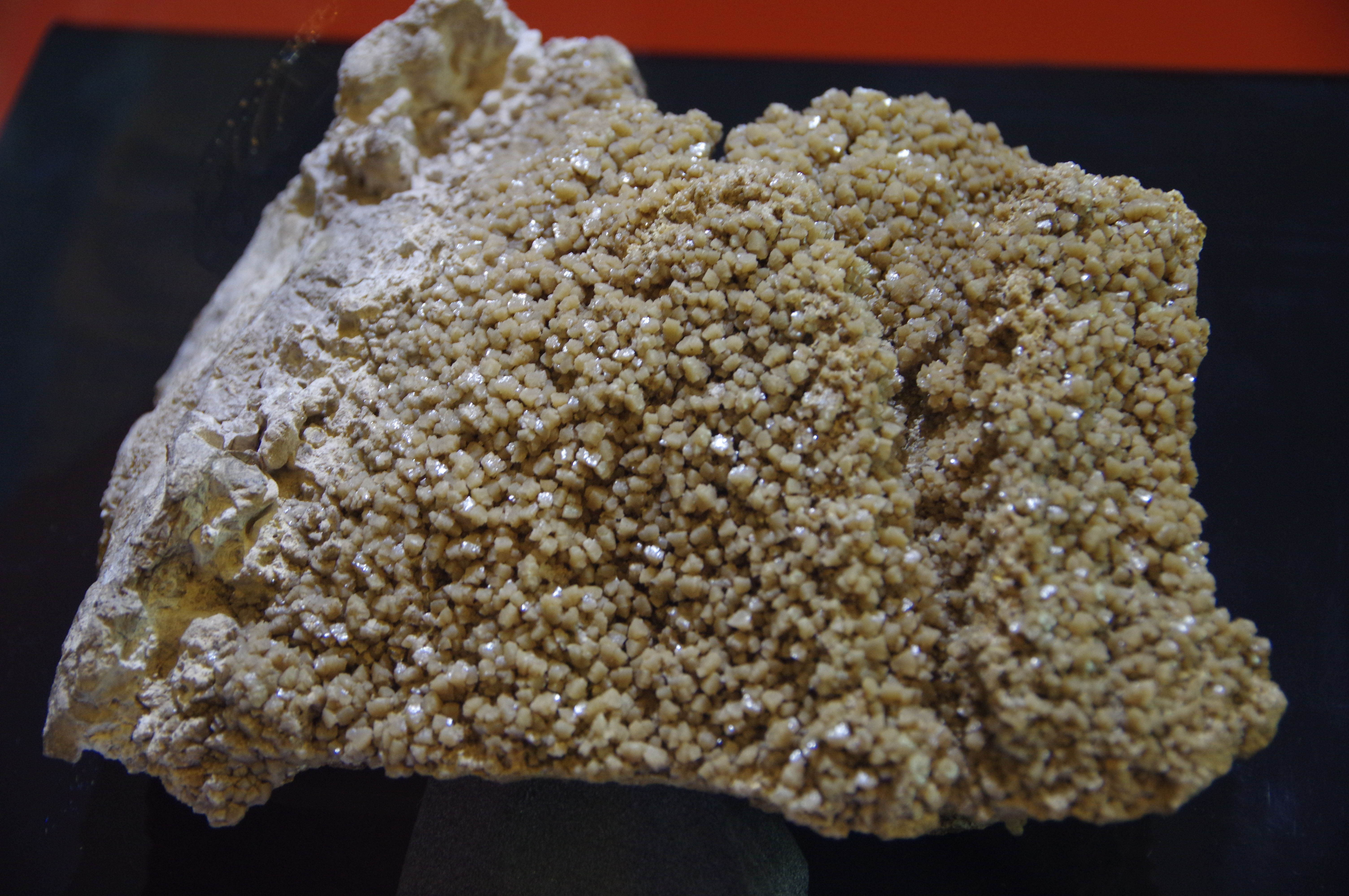 國立臺灣博物館藏北投石樣本